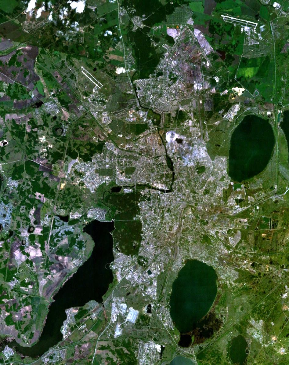 Chelyabinsk, Russia